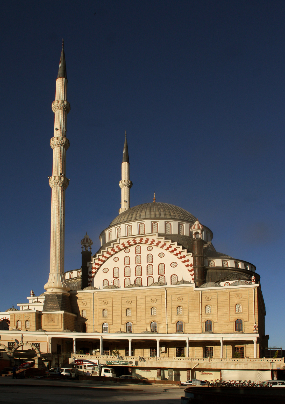 Die Saray-Camii (Palast-Moschee) im Zentrum von Elâzığ